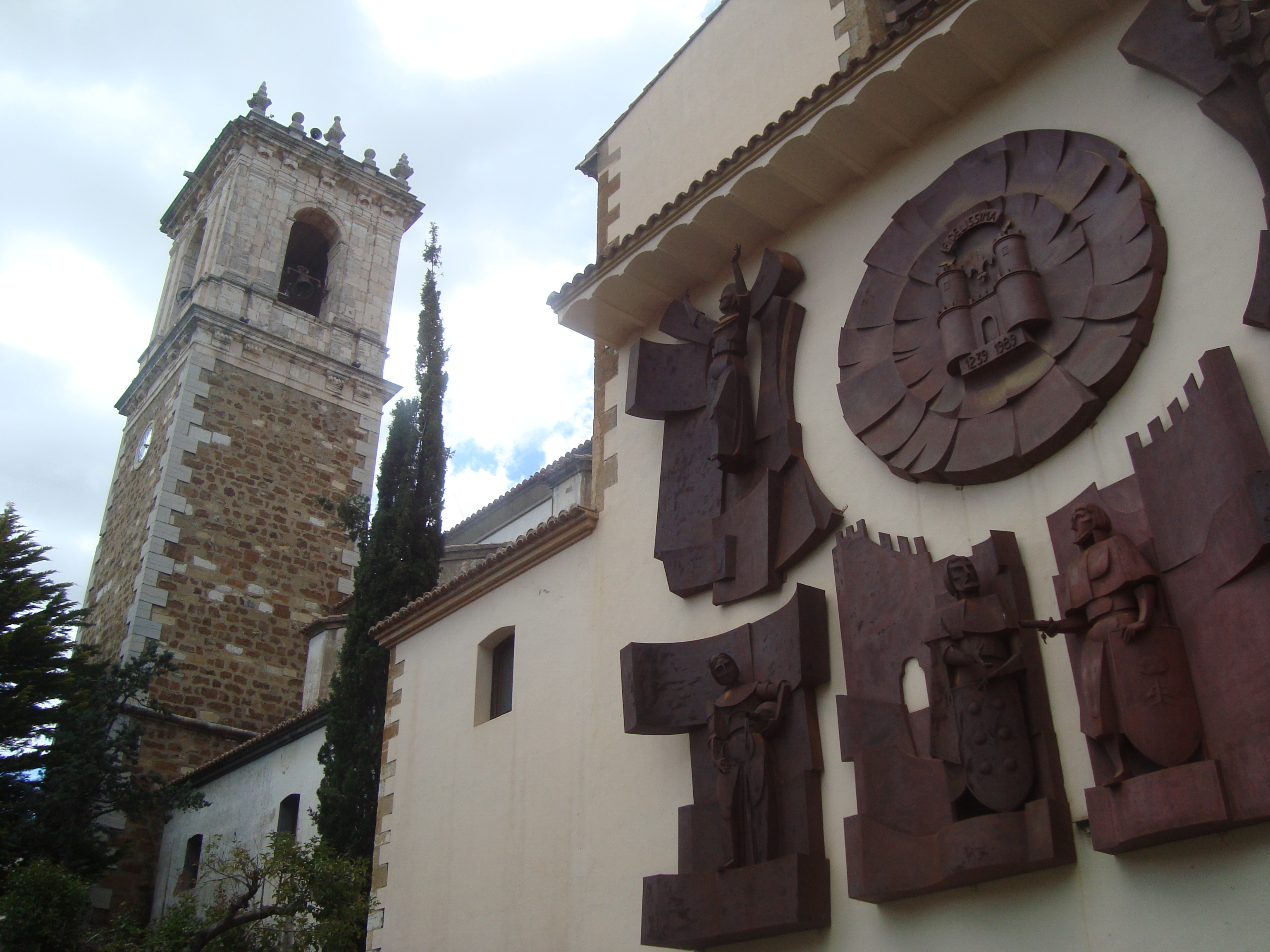 Església parroquial de l'Assumpció (Benassal) 02.026-008.